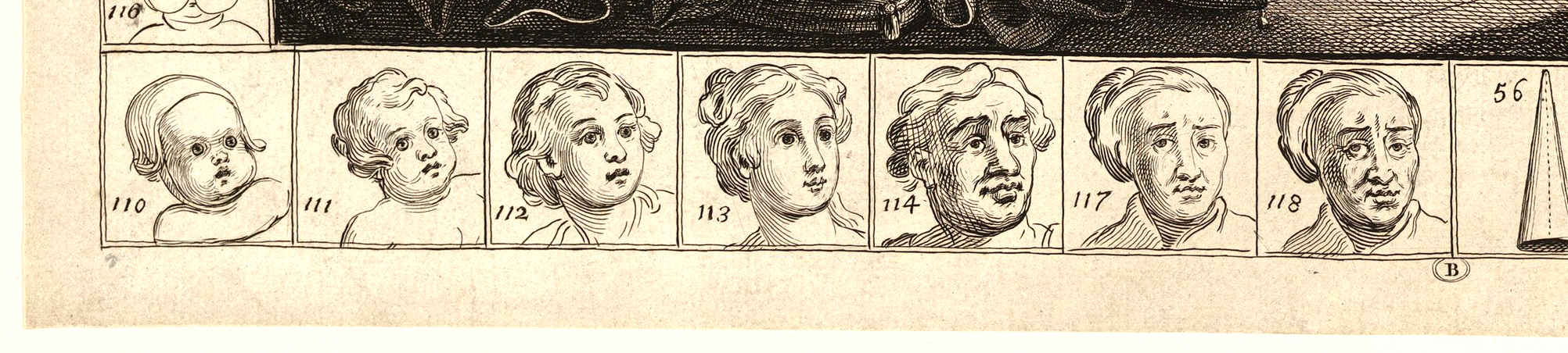 Dessin du visage d'une femme au cours de sa vie. Angle inférieur gauche d'une planche de Analysis of Beauty Plate 2 by William Hogarth.jpg